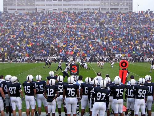 Penn State vs Akron in 2006.